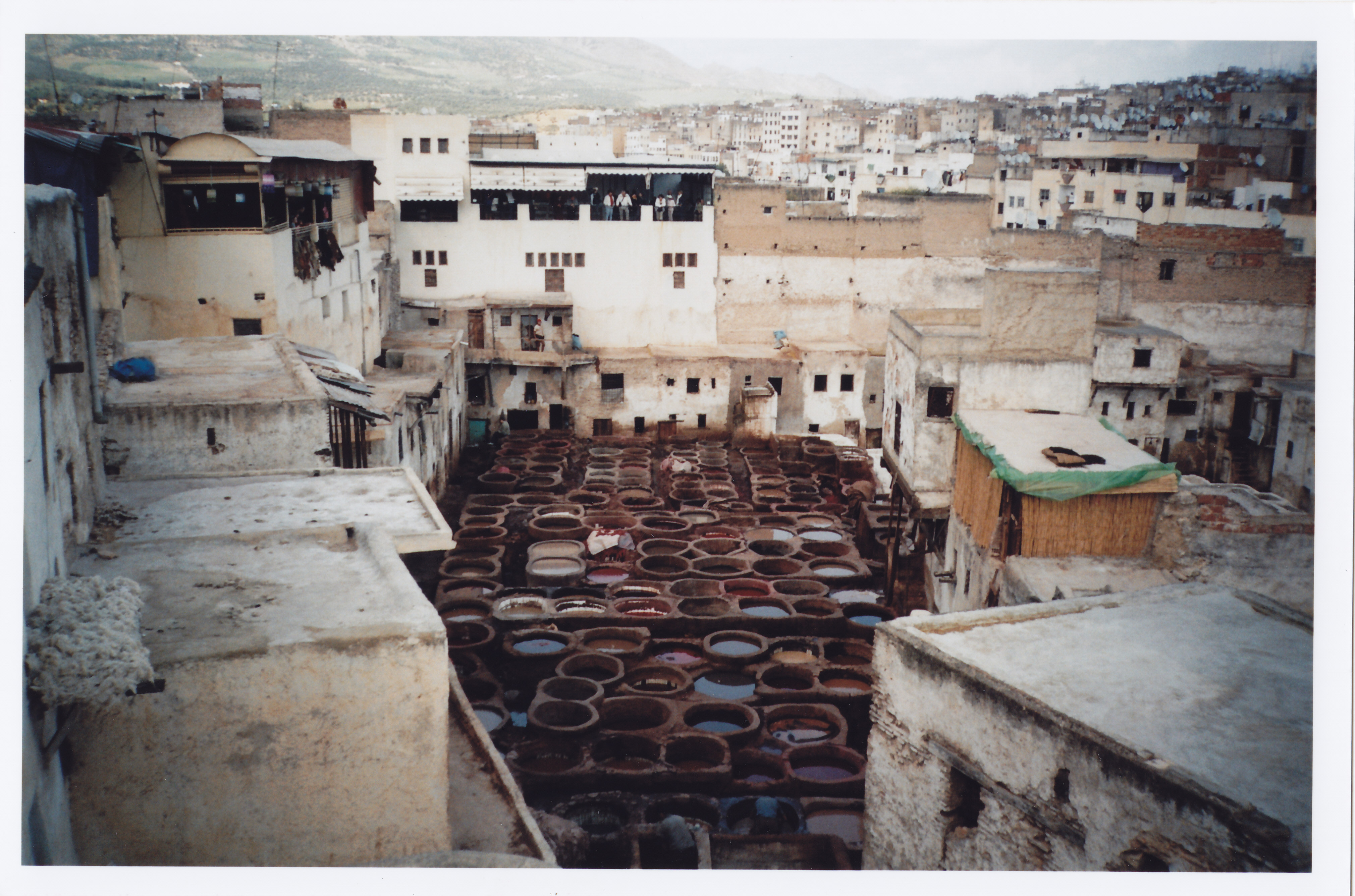 Vista de la curtiduría de Fez (Marruecos)desde los edificios que la rodean